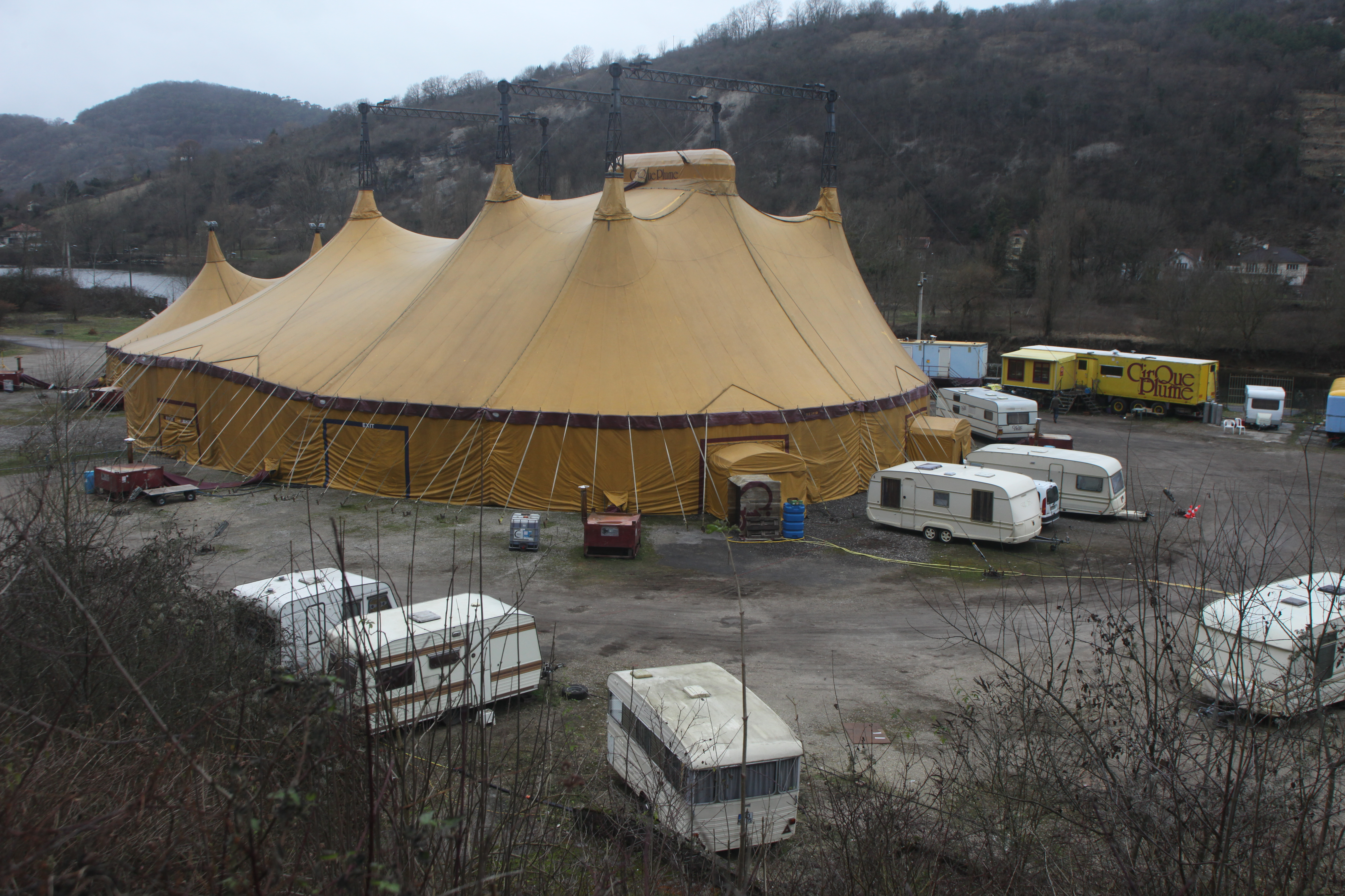 Le cirque Plume à Besançon.